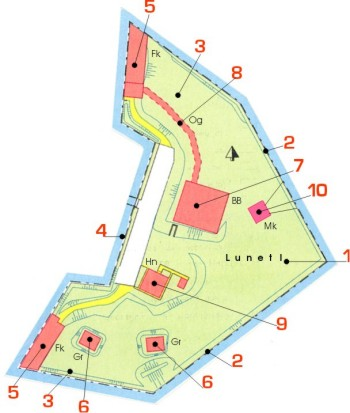 Map Lunet I. 1 saillant 2 facen 3 flanken 4 keel 5 flankkazemat 6 groepsschuilplaatsen 7 atoombunker 8 ondergrondse verbindingsgang 9 houten noodgebouw 10 mitrailleurkazemat